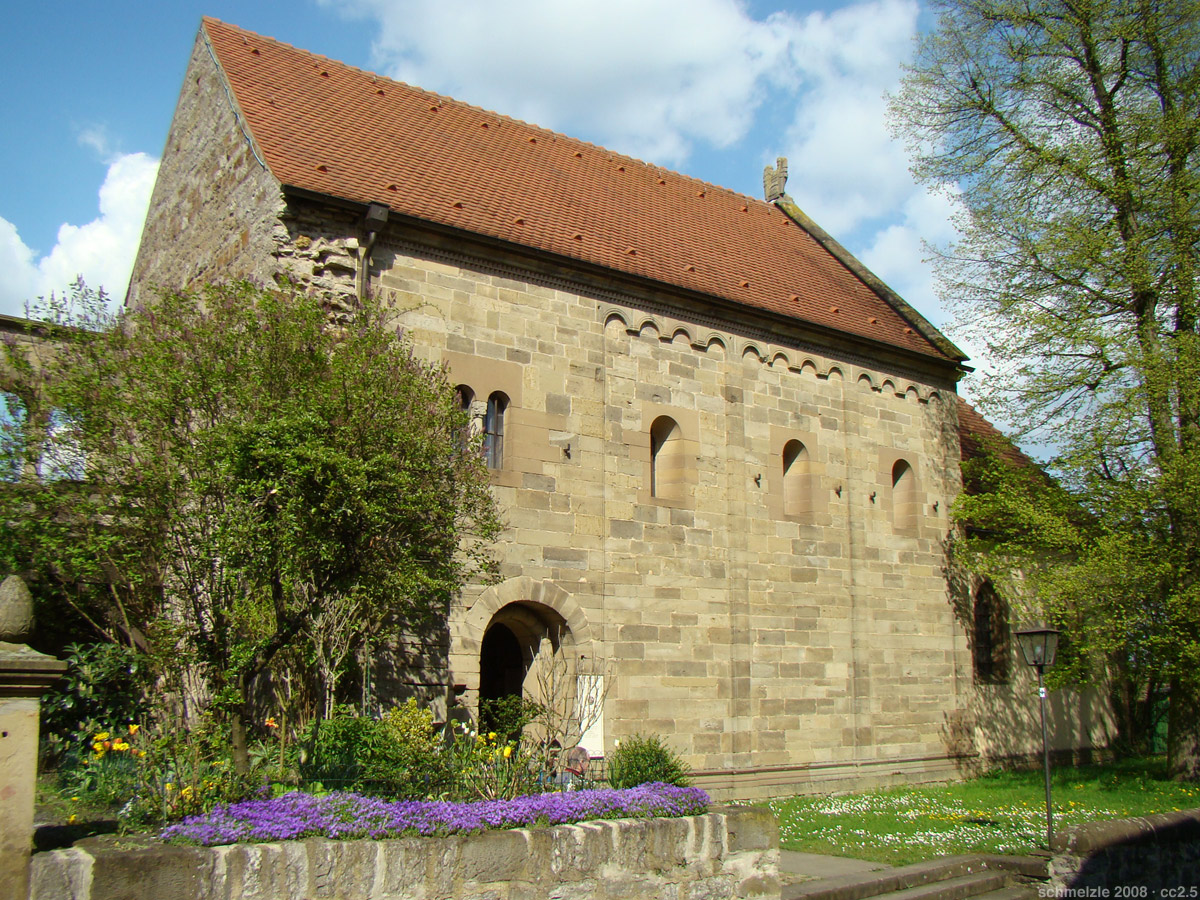 Bad Wimpfen, Burgviertel: Pfalzkapelle der ehem. Pfalz Wimpfen